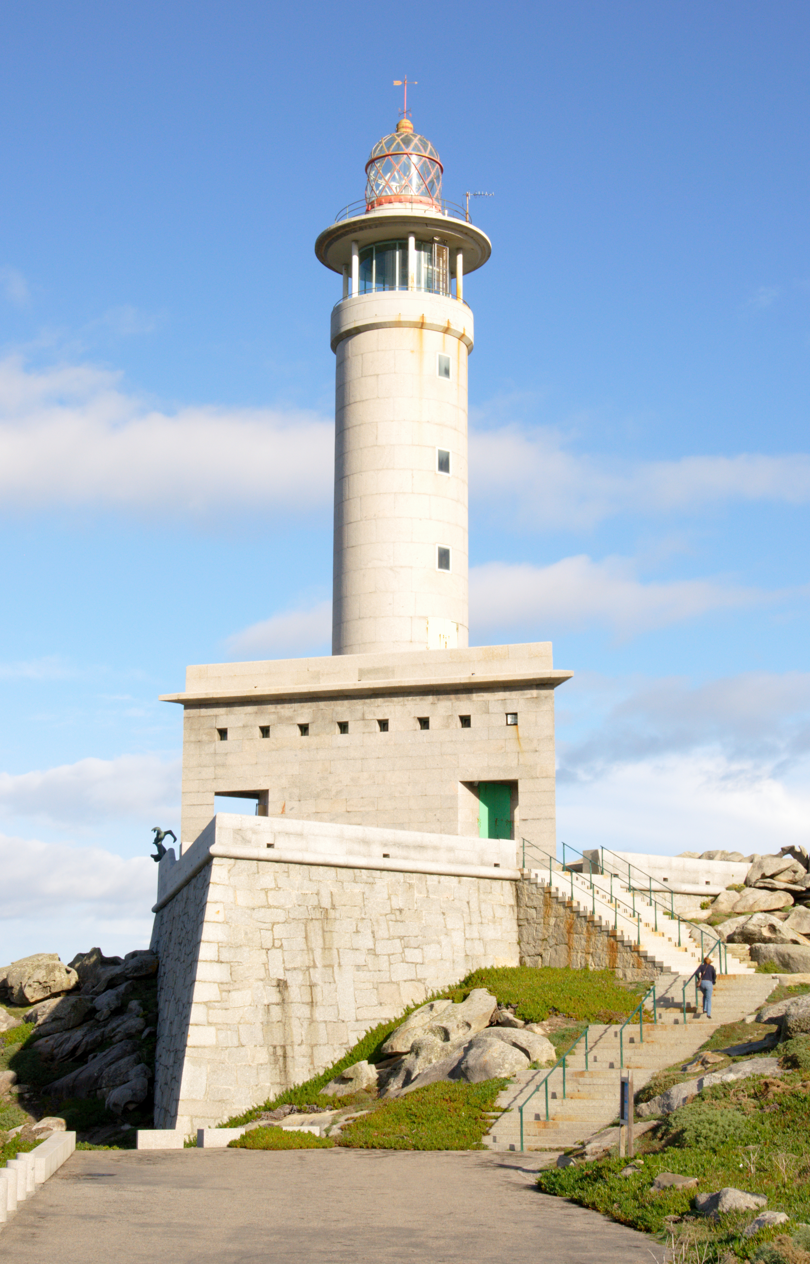 Faro de la Punta Nariga